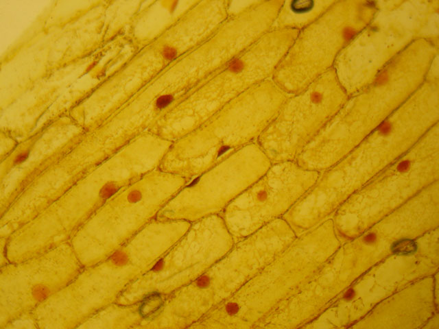 Objekt: Zwiebelepidermis Vergrößerung: 100x Färbung: Jod Aufgenommen von: zituba